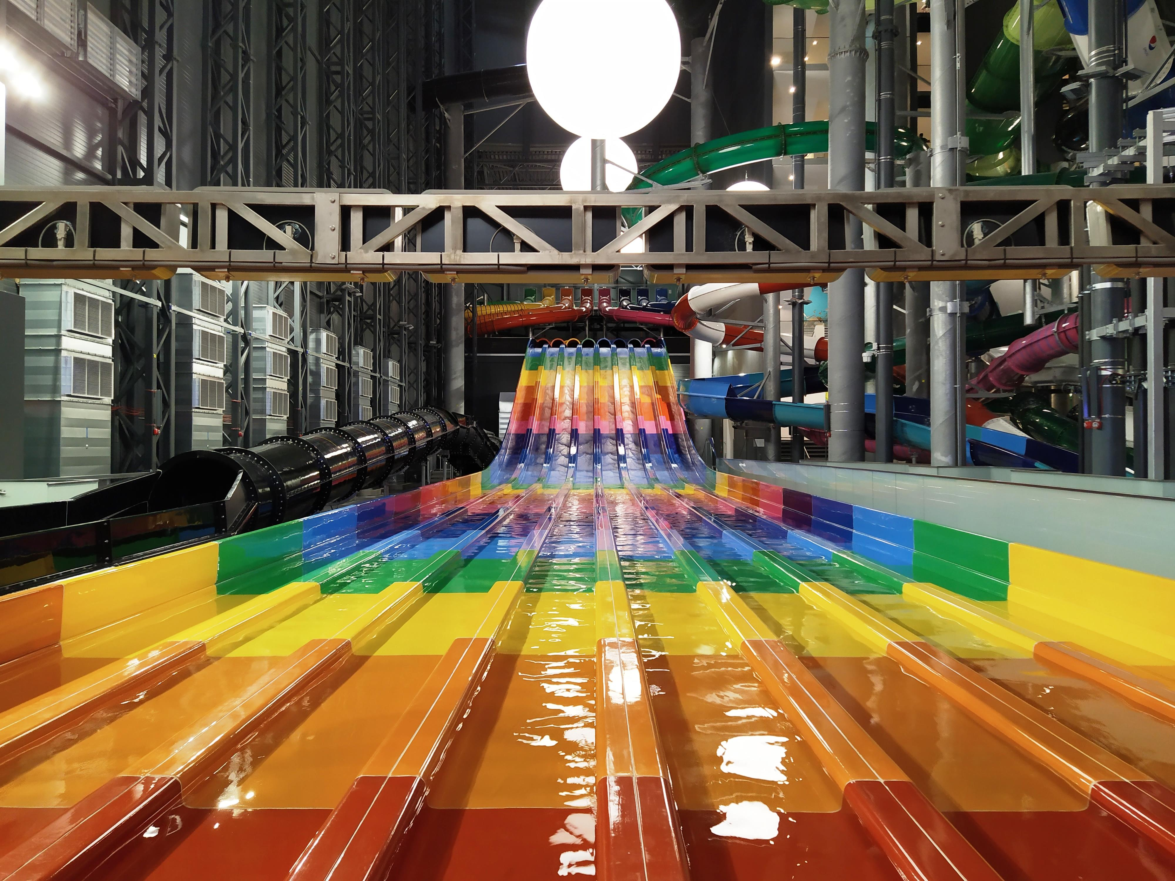 Suntago Wodny Świat - zjeżdżalnie wodne